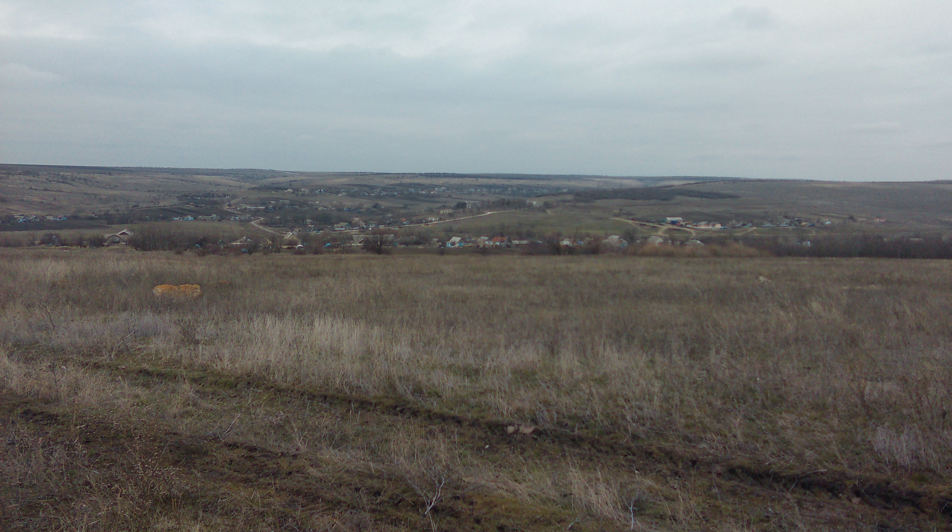 Поля біля села Михайлівка, Березівського району Одеської області